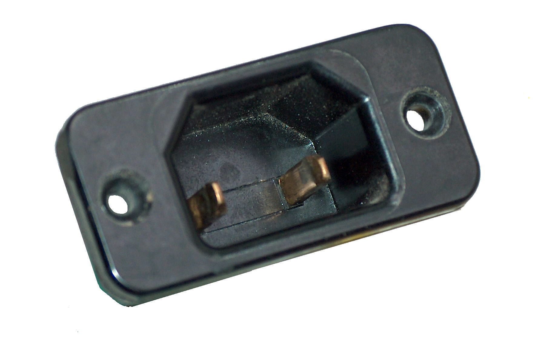 Kaltgeräteeinbaustecker (elektrisch, 230 Volt), 2polig, schwarz, angeschlossen an einen Staubsauger. Selbst fotografiert im April 2006. Photo taken by myself in April 2006. The socket (appliance inlet) was connected to a vacuum.